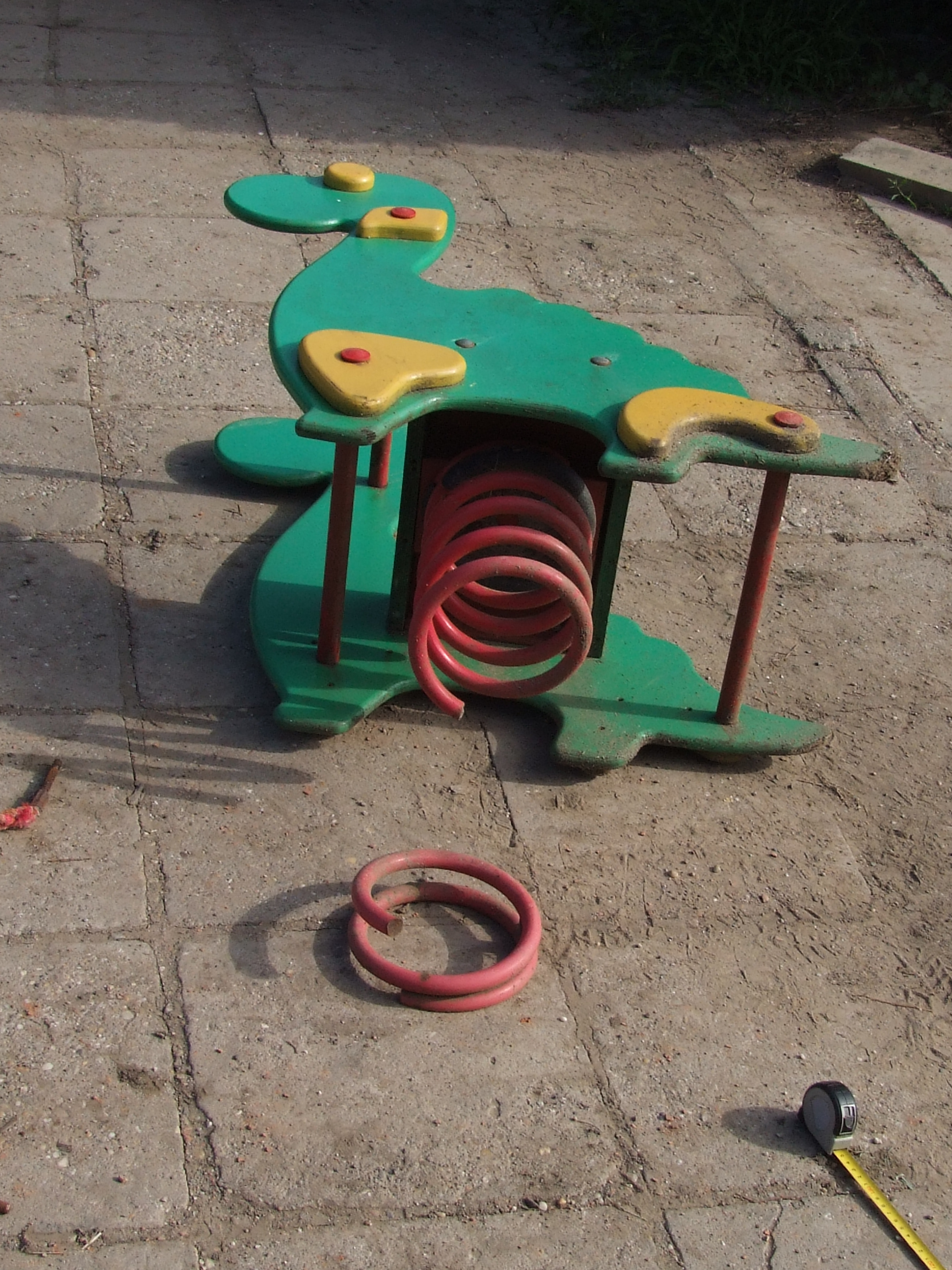 játék felújítás folyamtaban